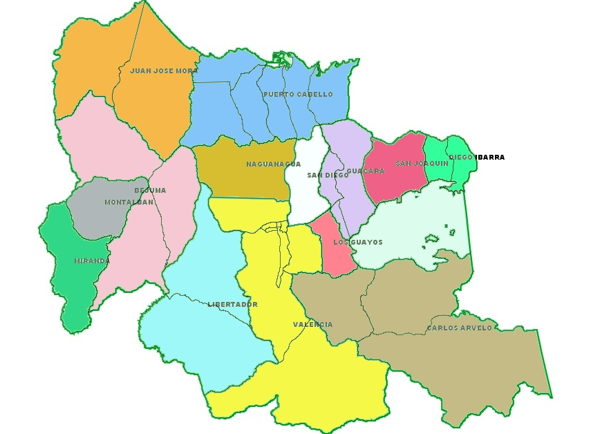 Carabobo